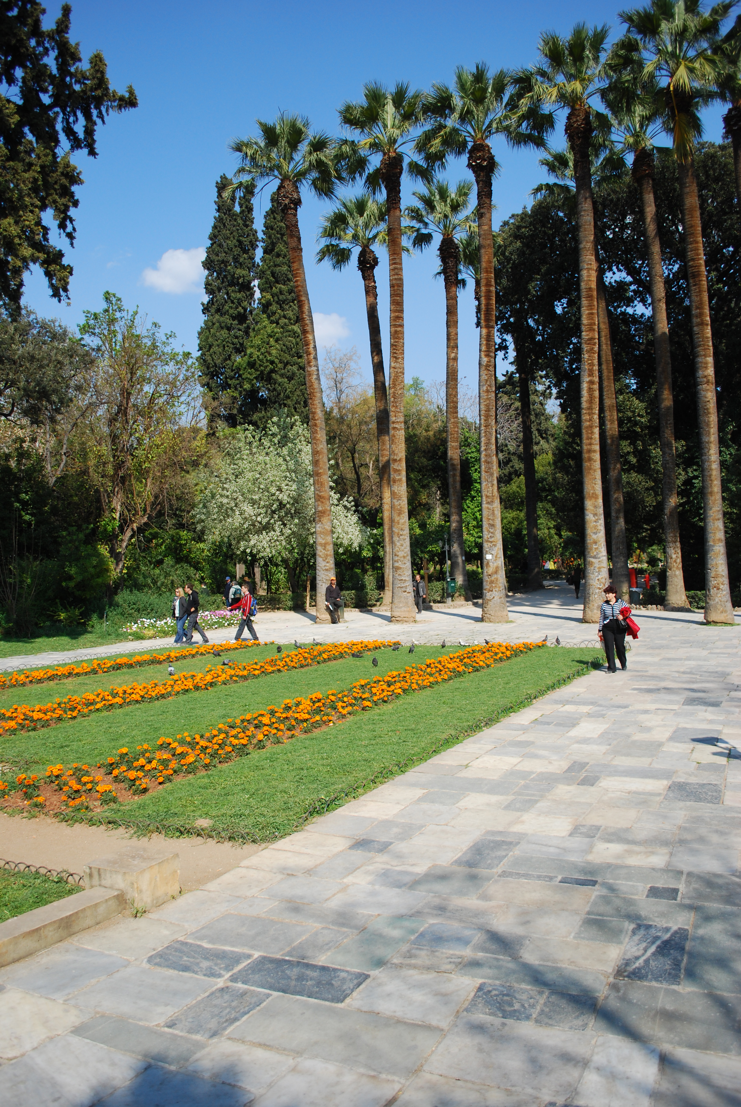 Athènes : le Jardin National.